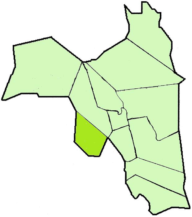 Lapinjärven kartta: Rutumin sijainti